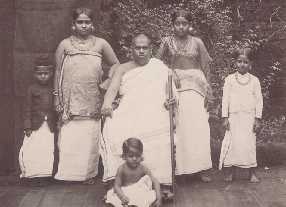 ബ്രാഹ്മണകുടുംബം